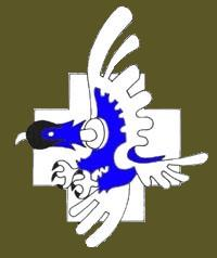 Godło 151 eskadry myśliwskiej wykonany na podstawie ilustracji z książki Jerzego Pawlaka "Polskie eskadry w Wojnie Obronnej 1939"